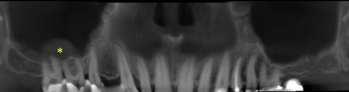 Dentale Volumentomografie des Oberkiefers und der Kieferhöhlen. Deutlich ist eine basale Kieferhöhlenschleimhauthyperplasie rechtsseitig regio 16/17 wie sie auch nach akuten apikalen Parodontitiden beobachtet wird. Differentialdiagnostisch kommt eine rein rhinogene Schleimhautschwellung (chronische Sinusits) in Frage.